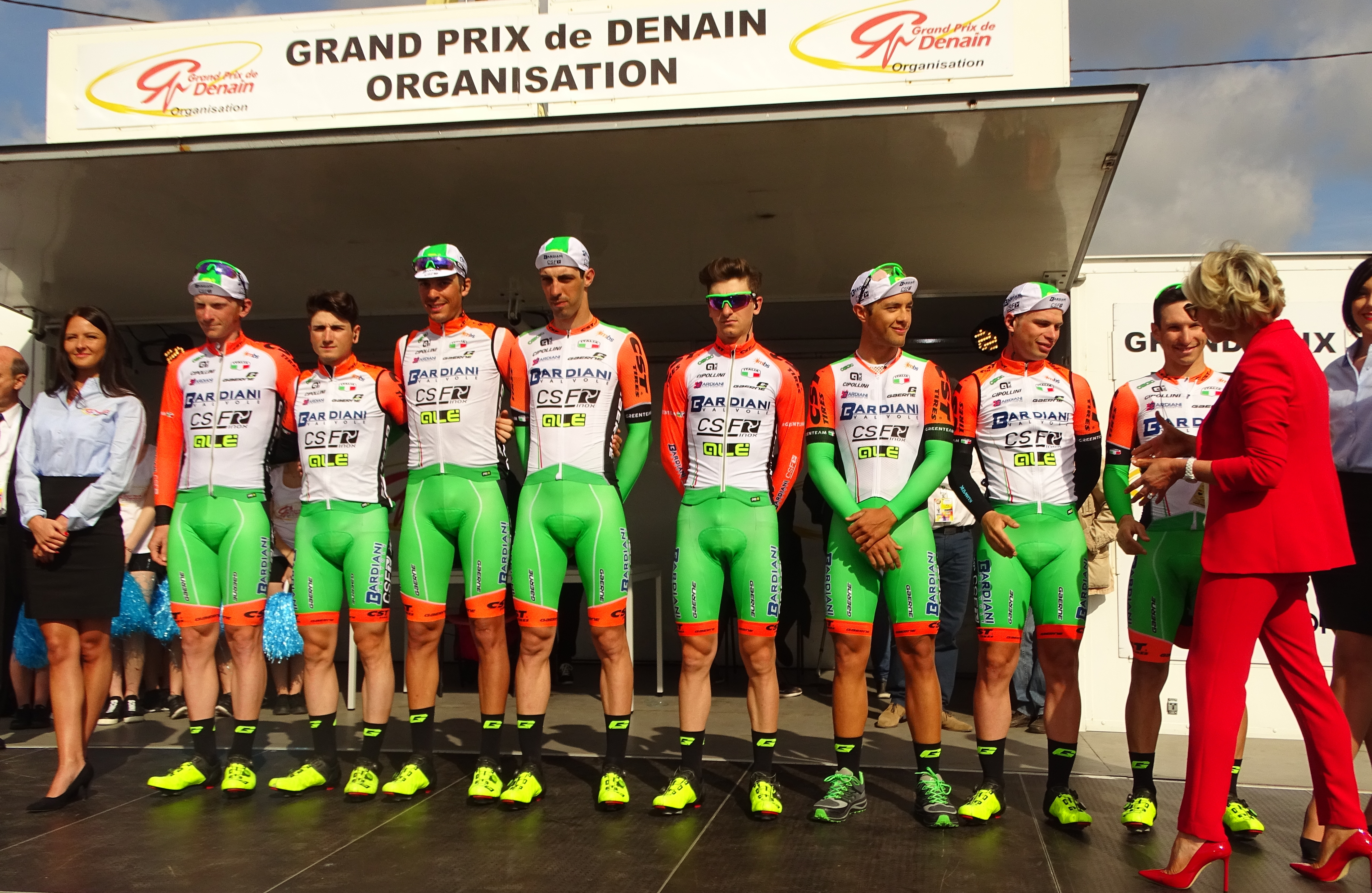 Reportage réalisé le jeudi 13 avril à l'occasion du départ et de l'arrivée du Grand Prix de Denain 2017 à Denain, Nord, Nord-Pas-de-Calais-Picardie, France.